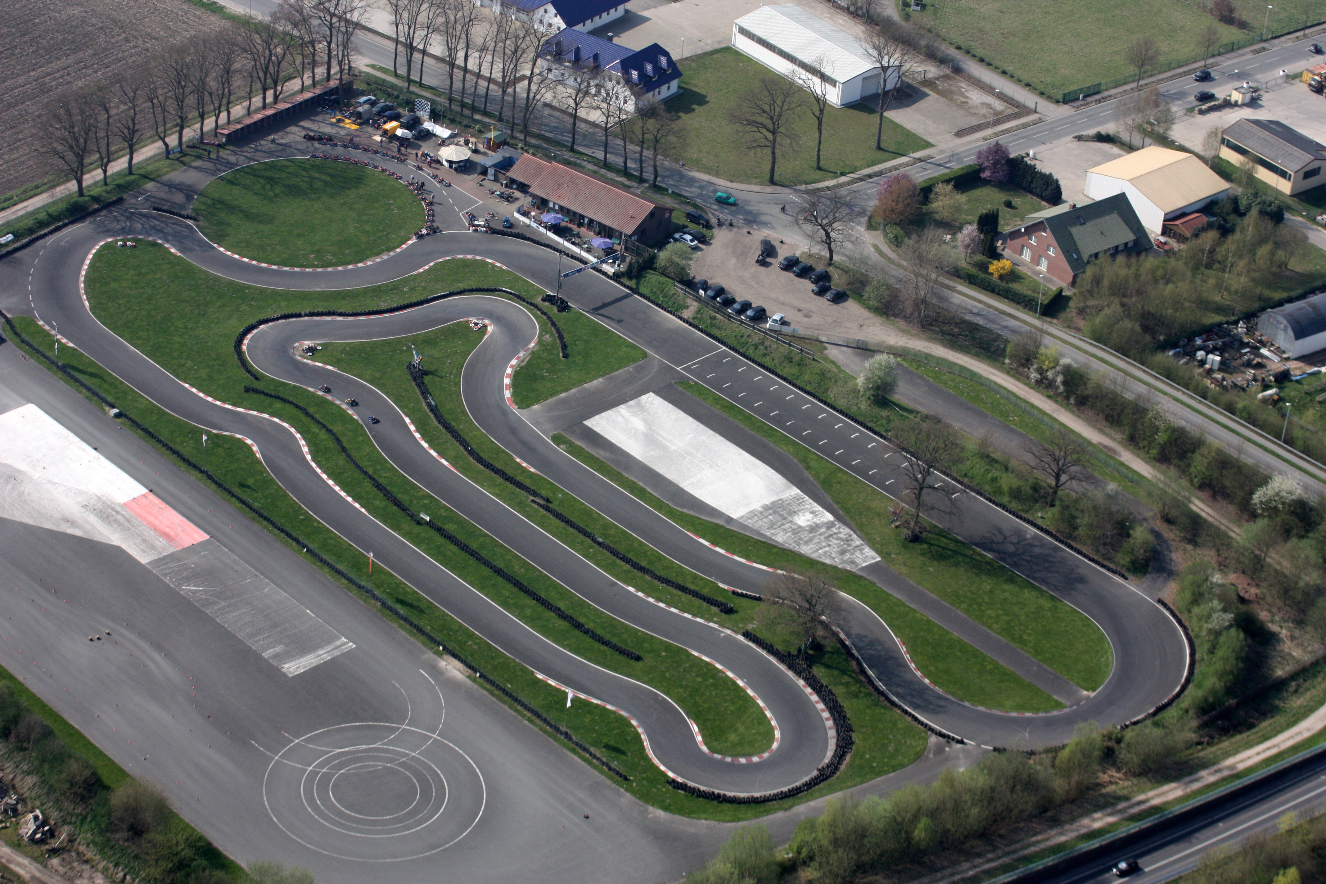 Luftbild der Go-Kart-Bahn in Bassum